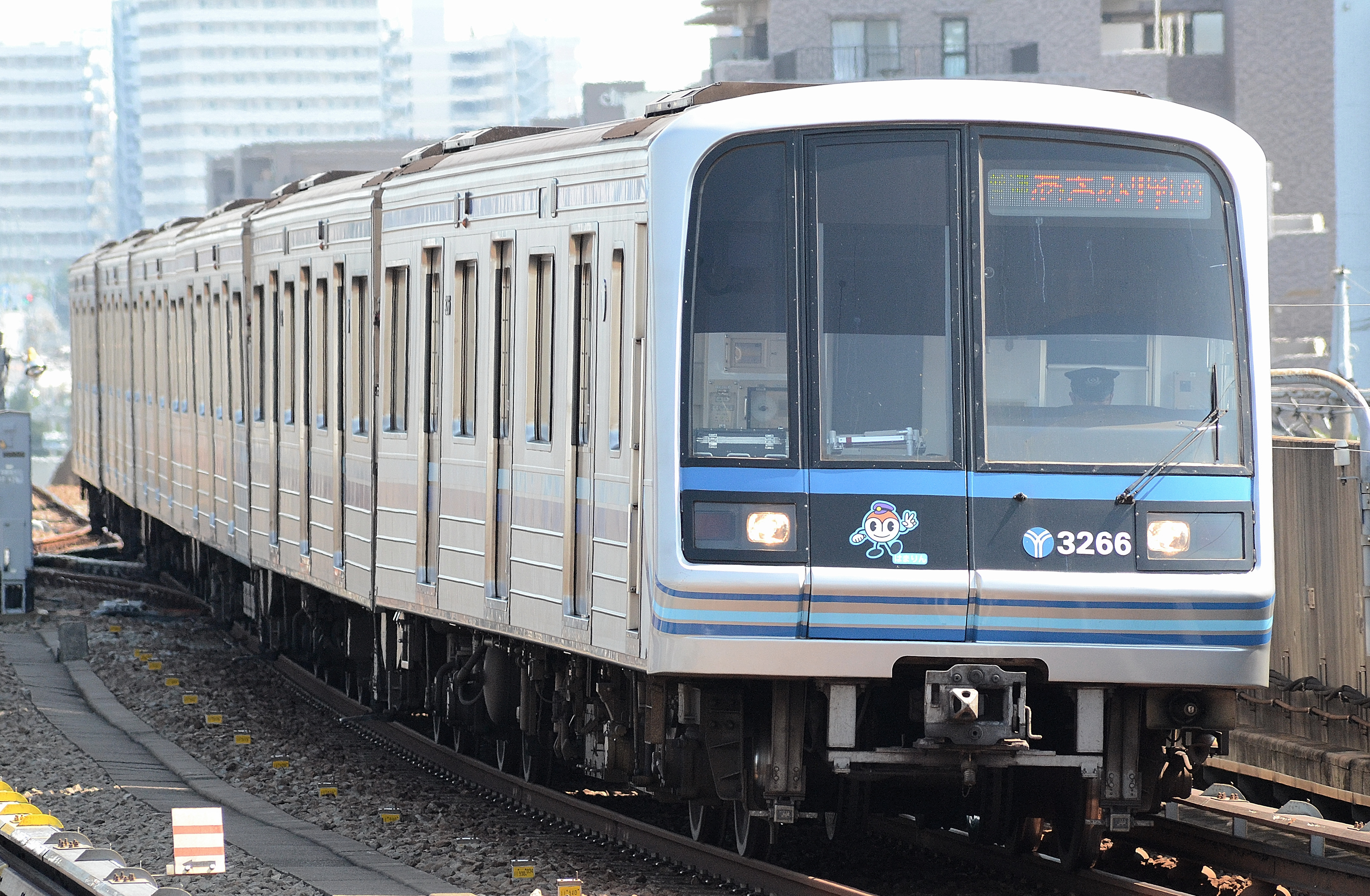 新羽駅に到着する横浜市営地下鉄3000A系